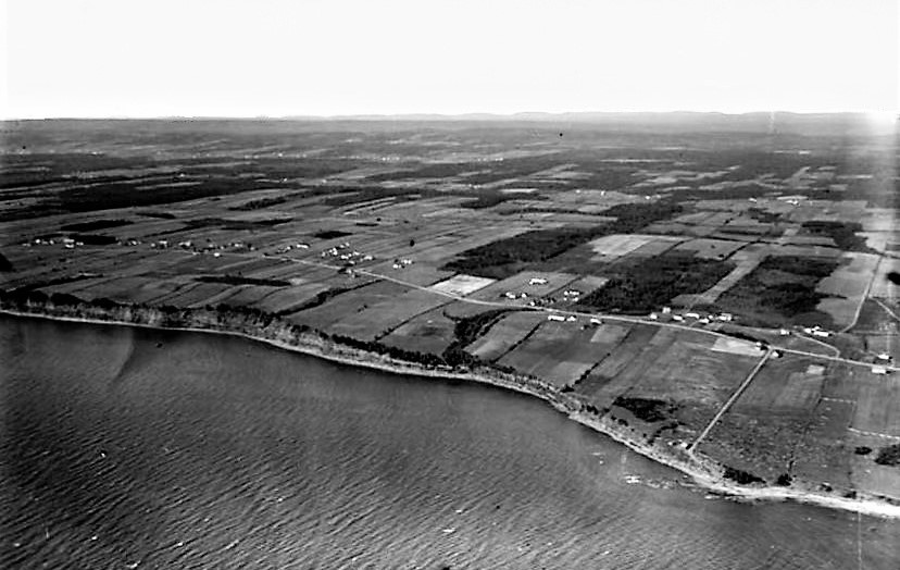 Pointe aux Loups Marins et Shigawake-Est; comté Bonaventure Vue aérienne